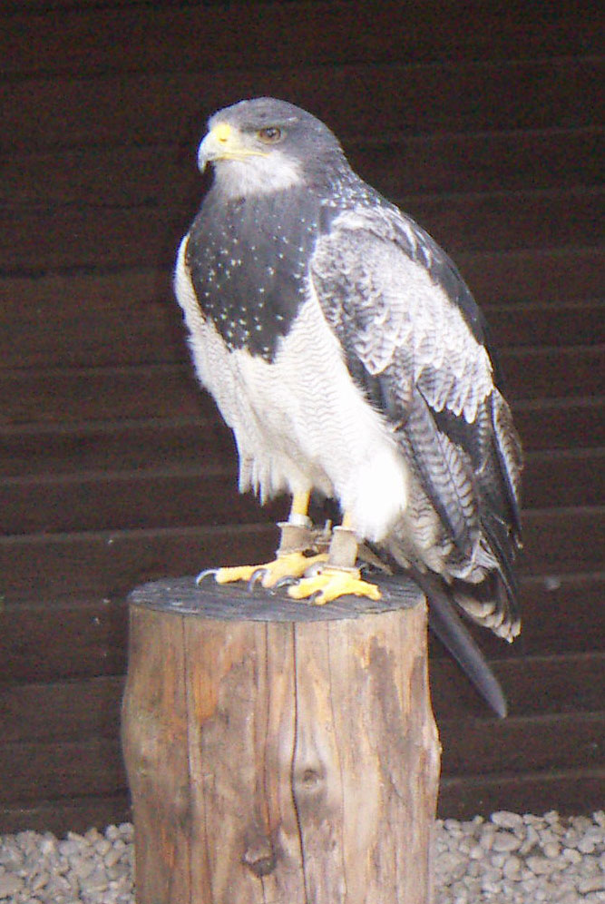 Aguja (Blaufussbussard) aufgenommen im Wildgehege Hellenthal, Eifel, Deutschland